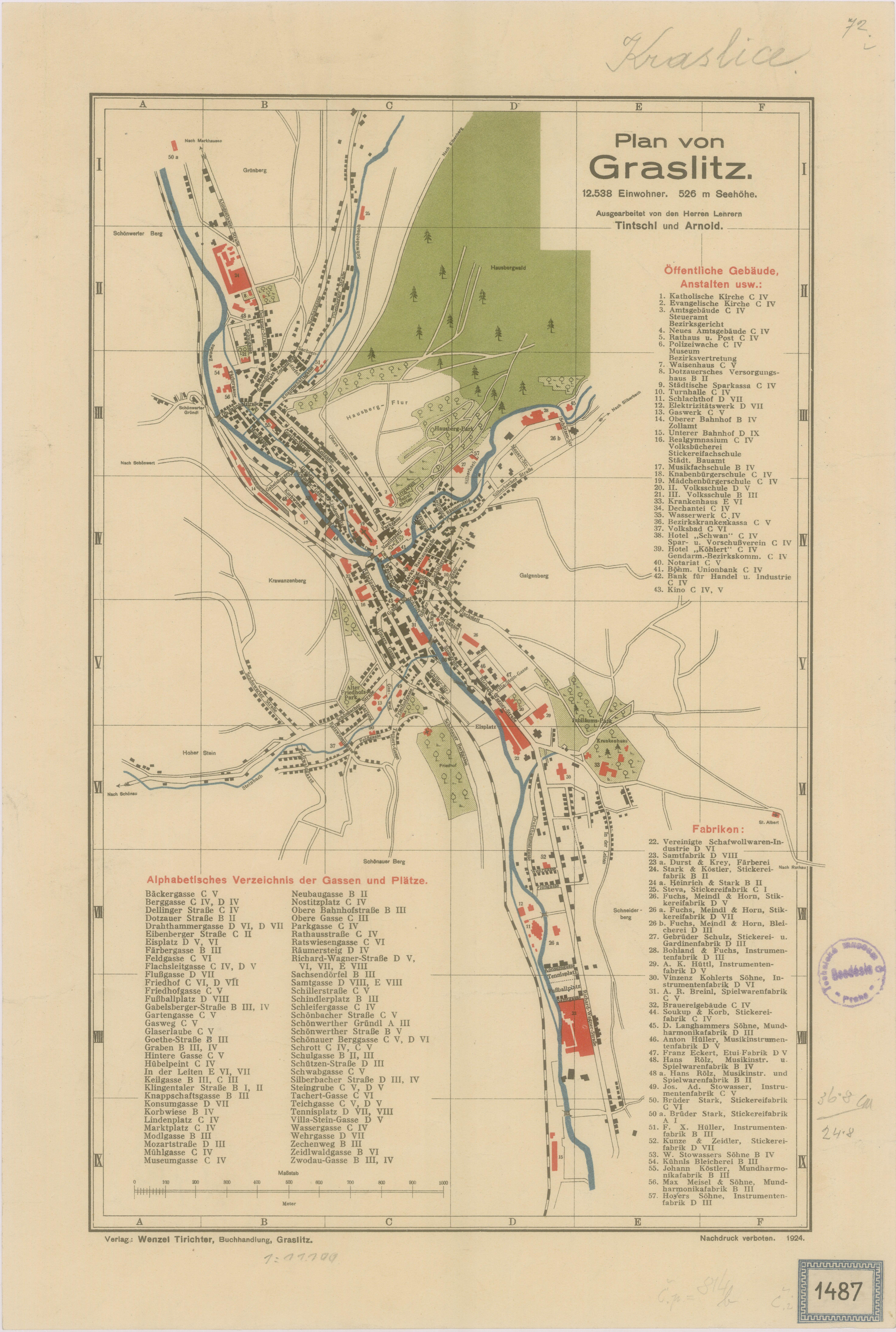 Digital watermarks from Národní technické muzeum removed.